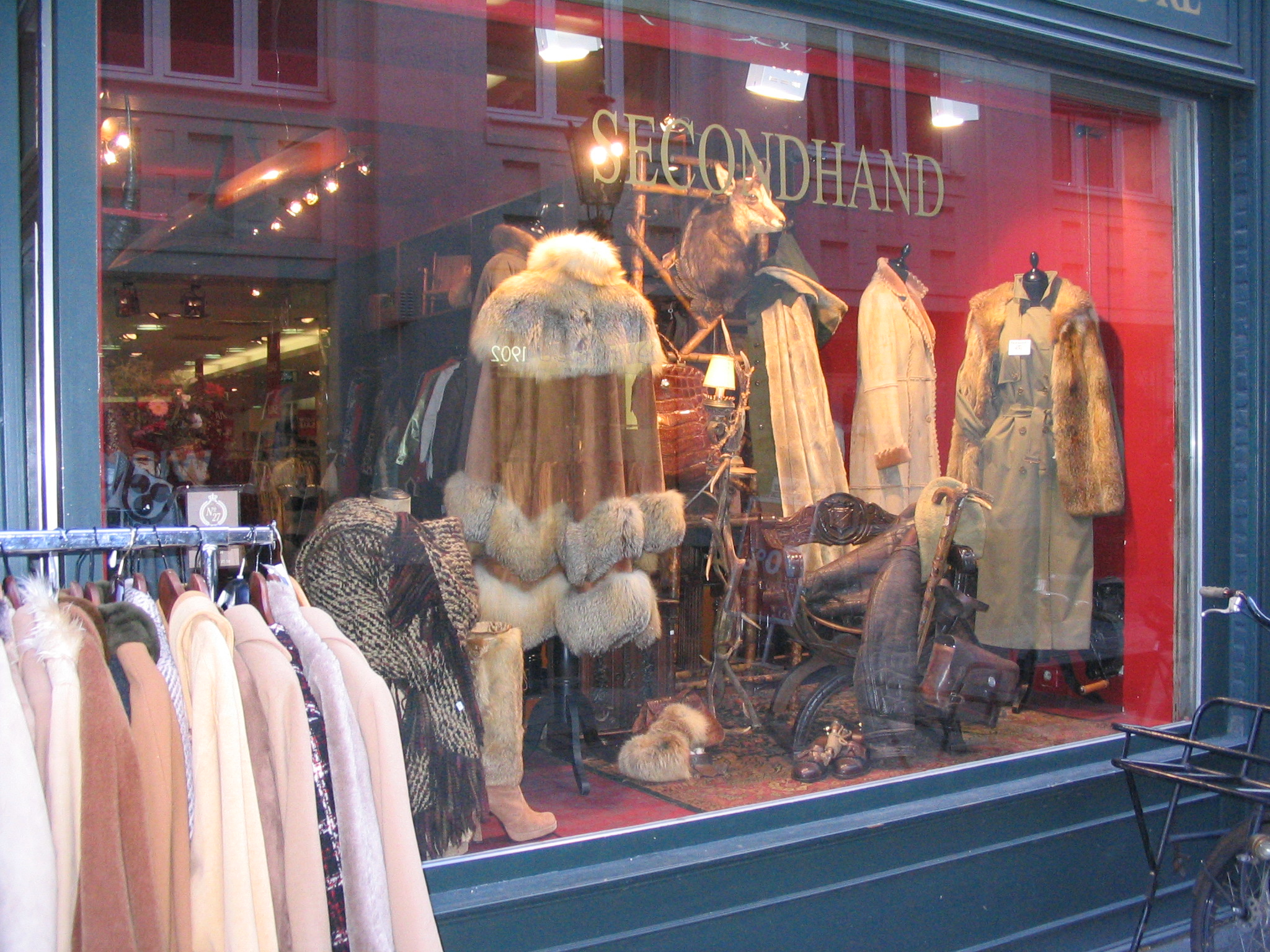 Düsseldorf, Wallstraße 9. Schaufenster „Wall Street 9“ (seit 2015 „Vintage Paradise“).